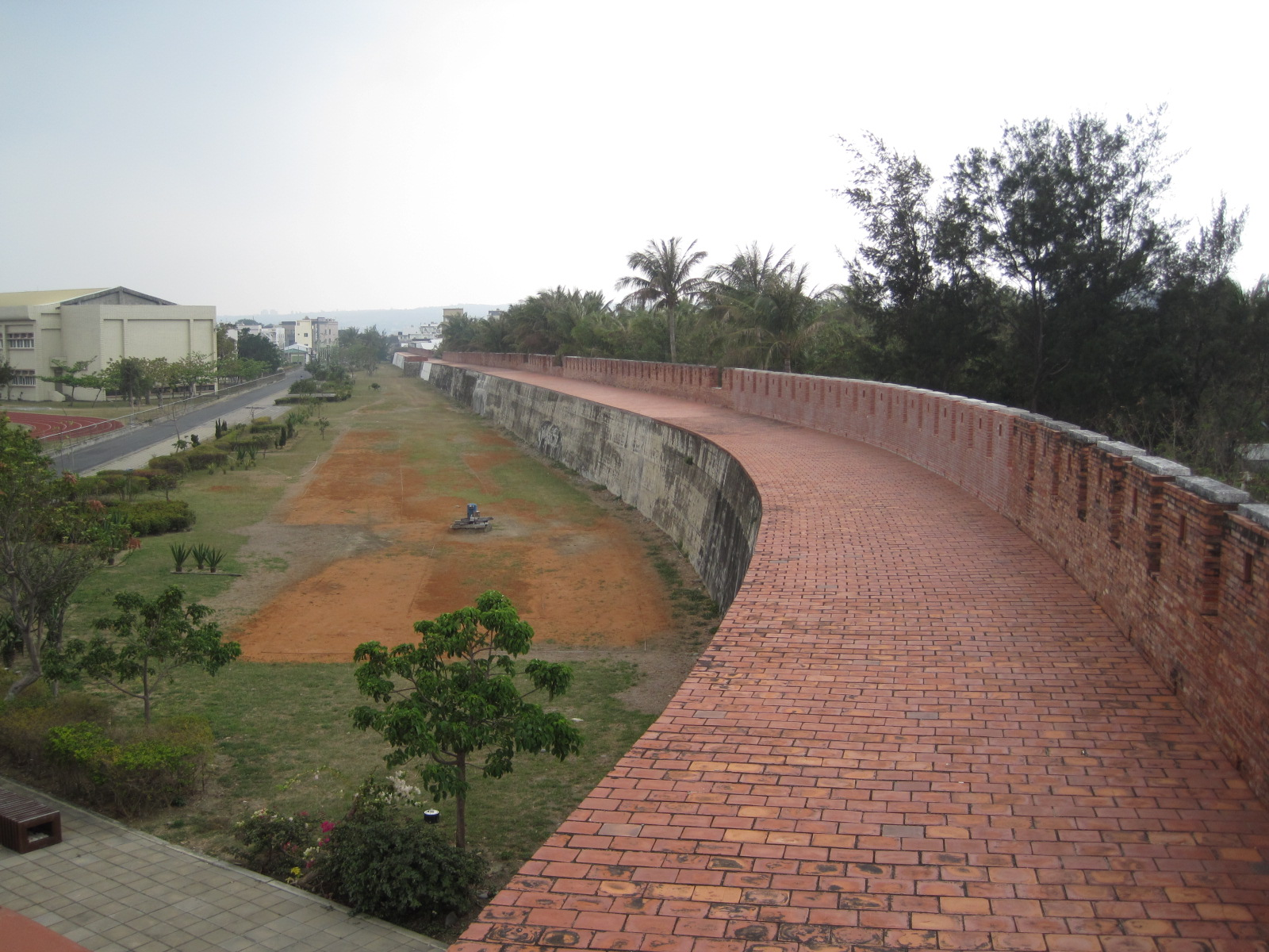 北門往西門方向的城垣